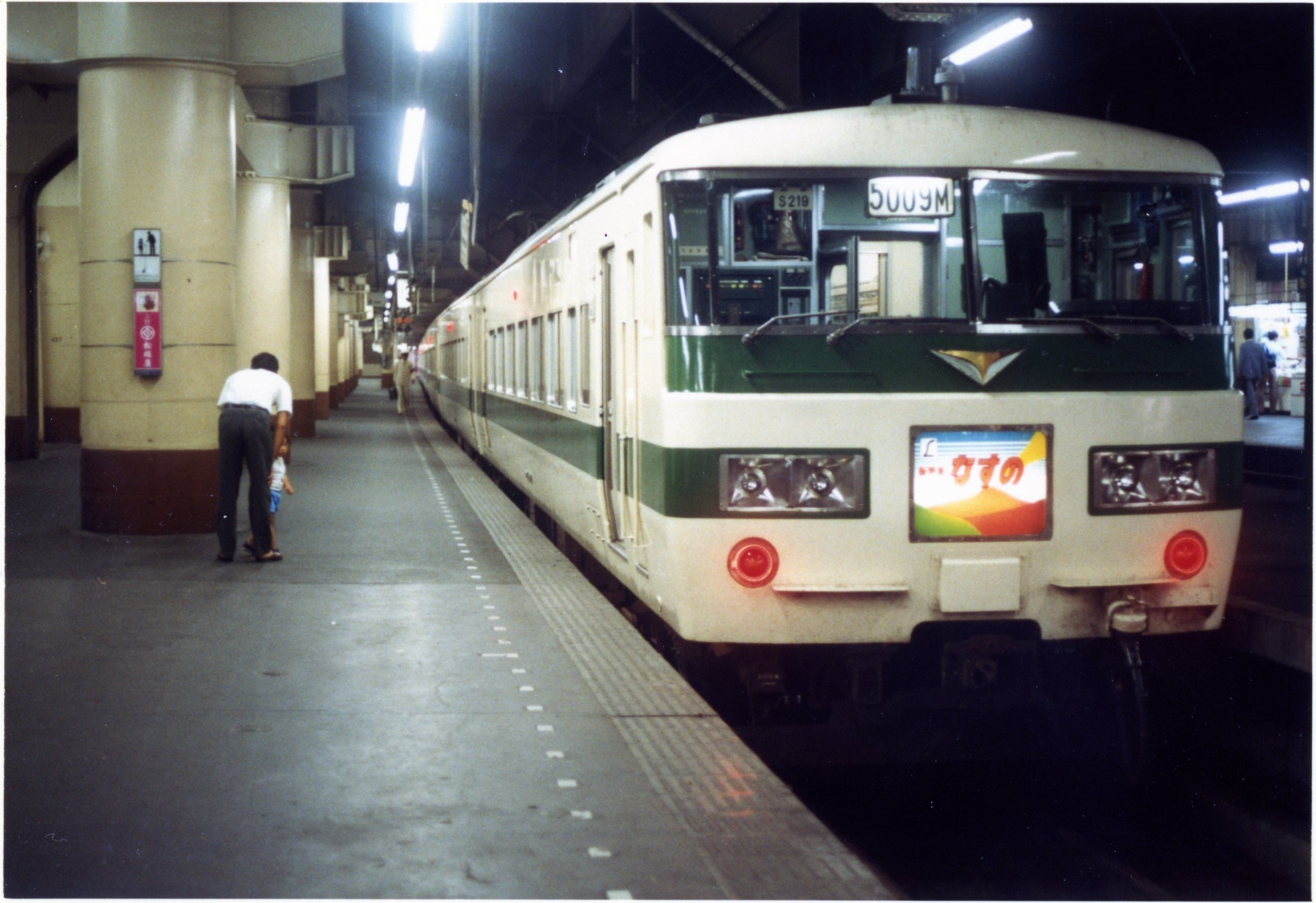 185系200番台 新特急「なすの」 1986年、上野駅で本人撮影